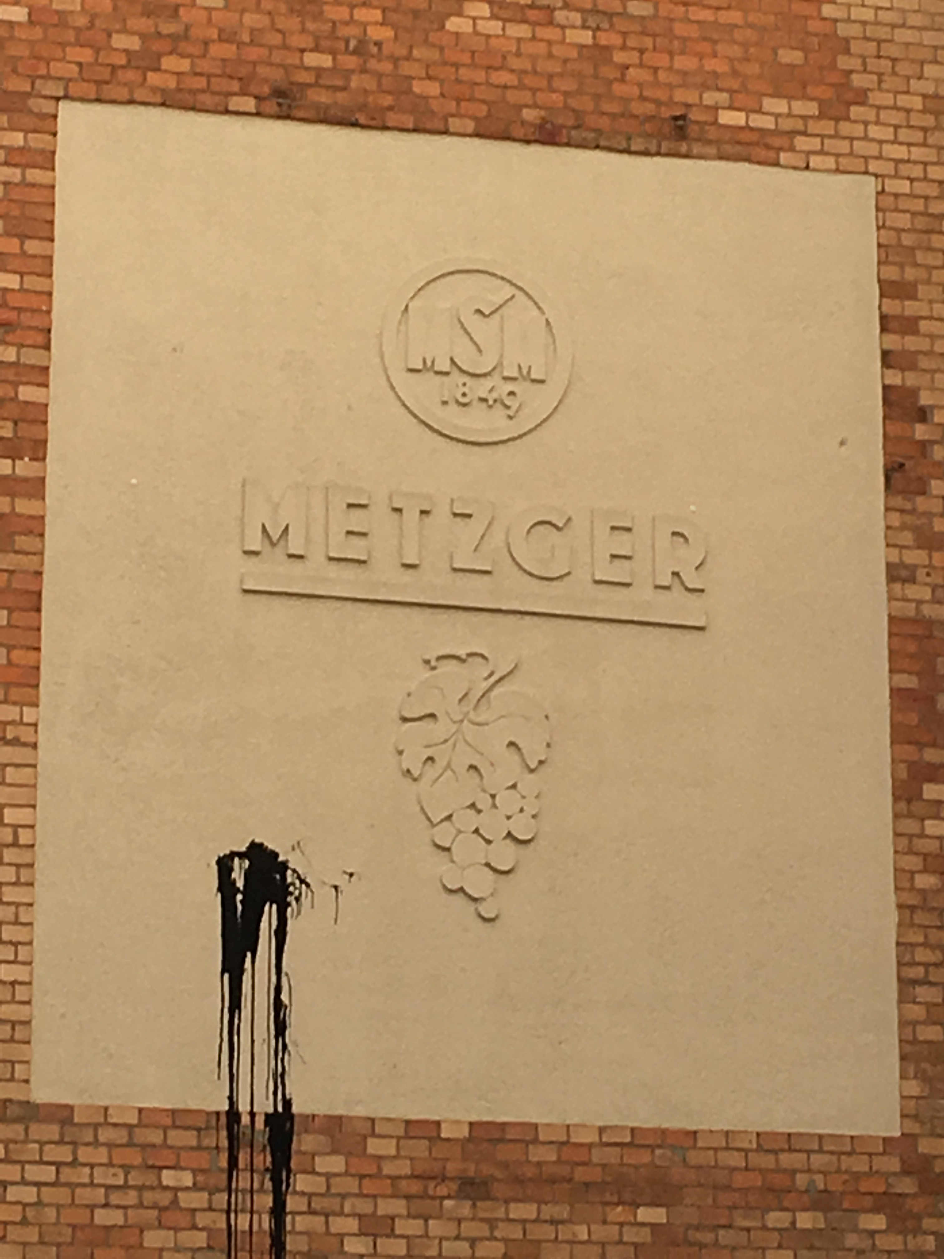 Metzger Weinhandel